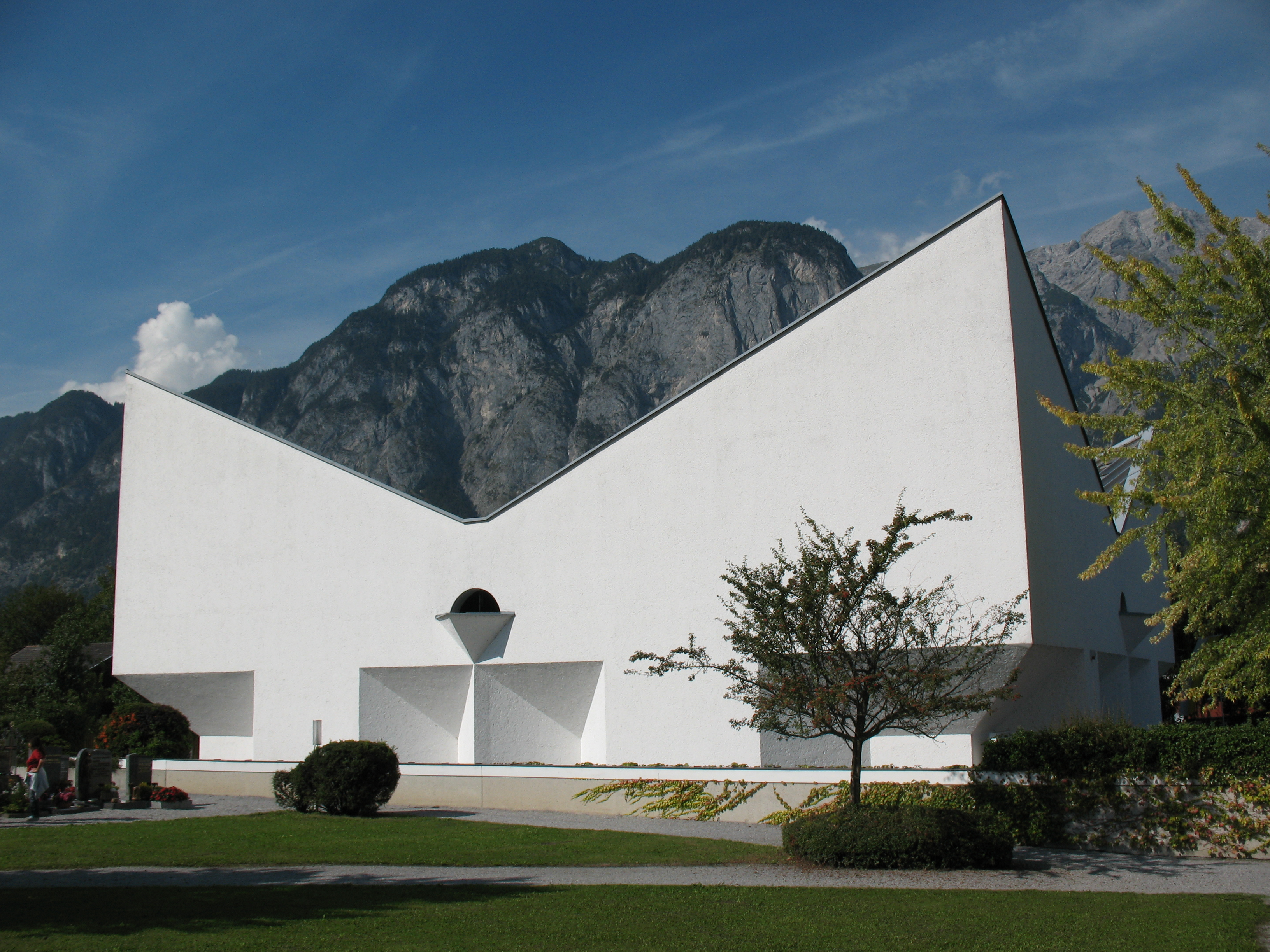 Kath. Pfarrkirche Zu Ehren Jesu Christi in Emmaus